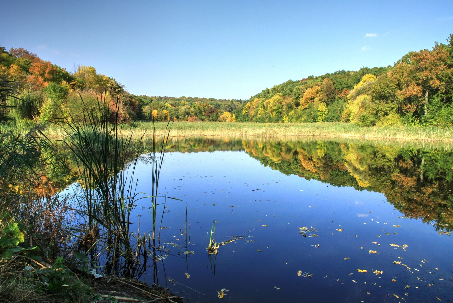 Цаулский парк, монумент природы, находится в Дондушенский район, с. Цаул (код MD-DN-map-010)